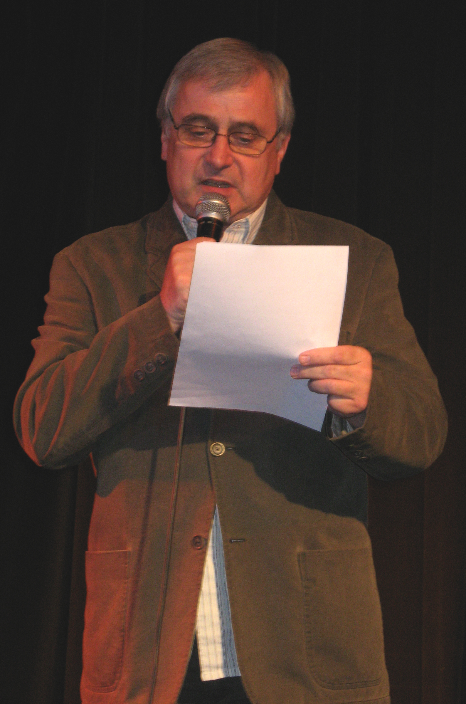 Krzysztof Jaślar - juror Warszawskiej Palmy 2008